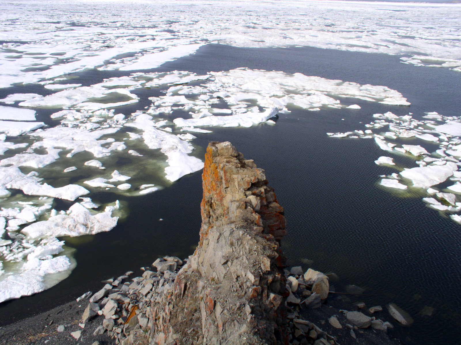 На пирсе